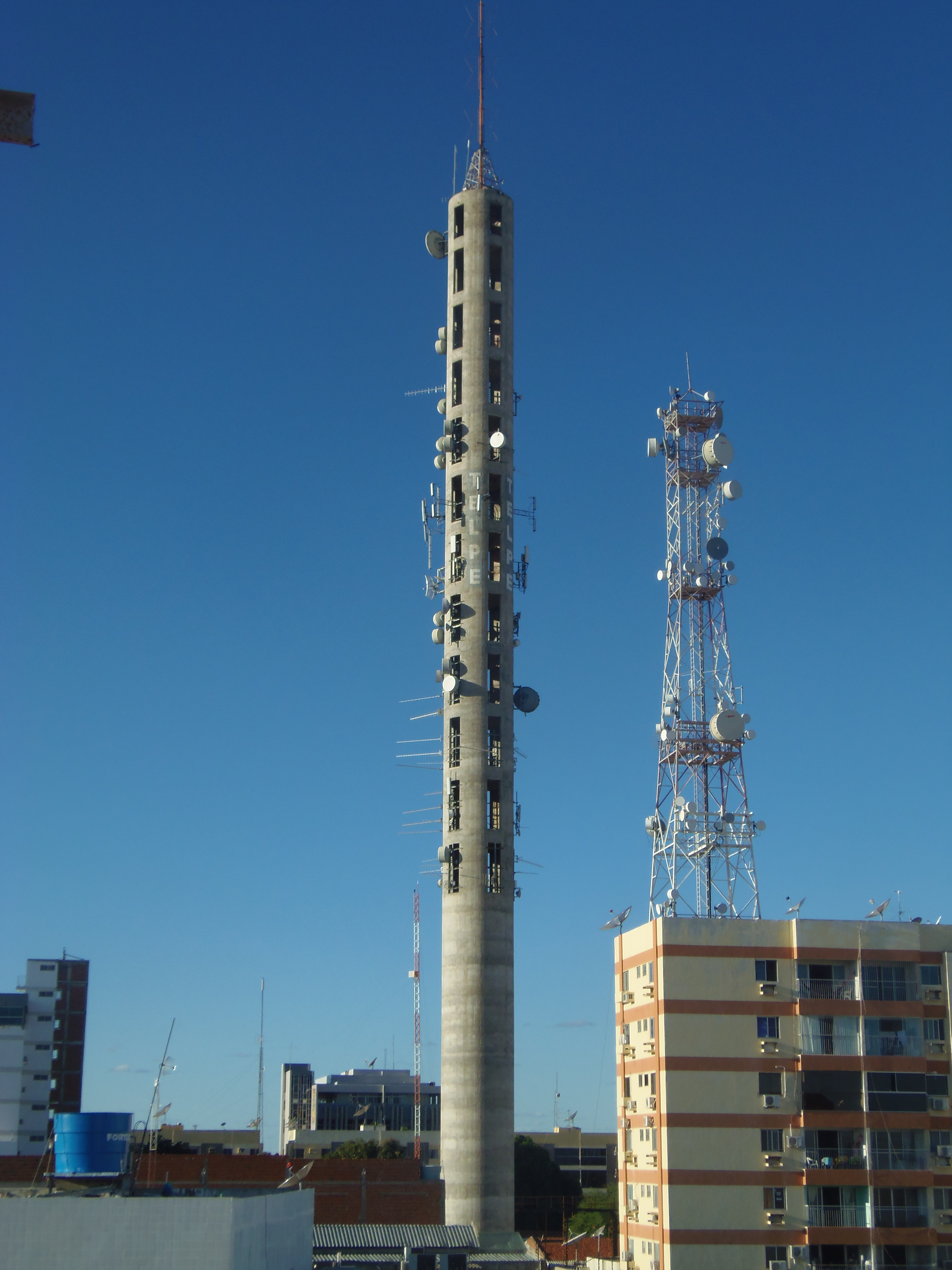 Torre da Embratel - Petrolina, Pernambuco, Brasil